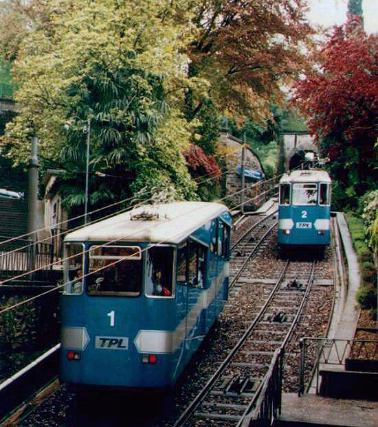 Eigen foto, GNU/FDL